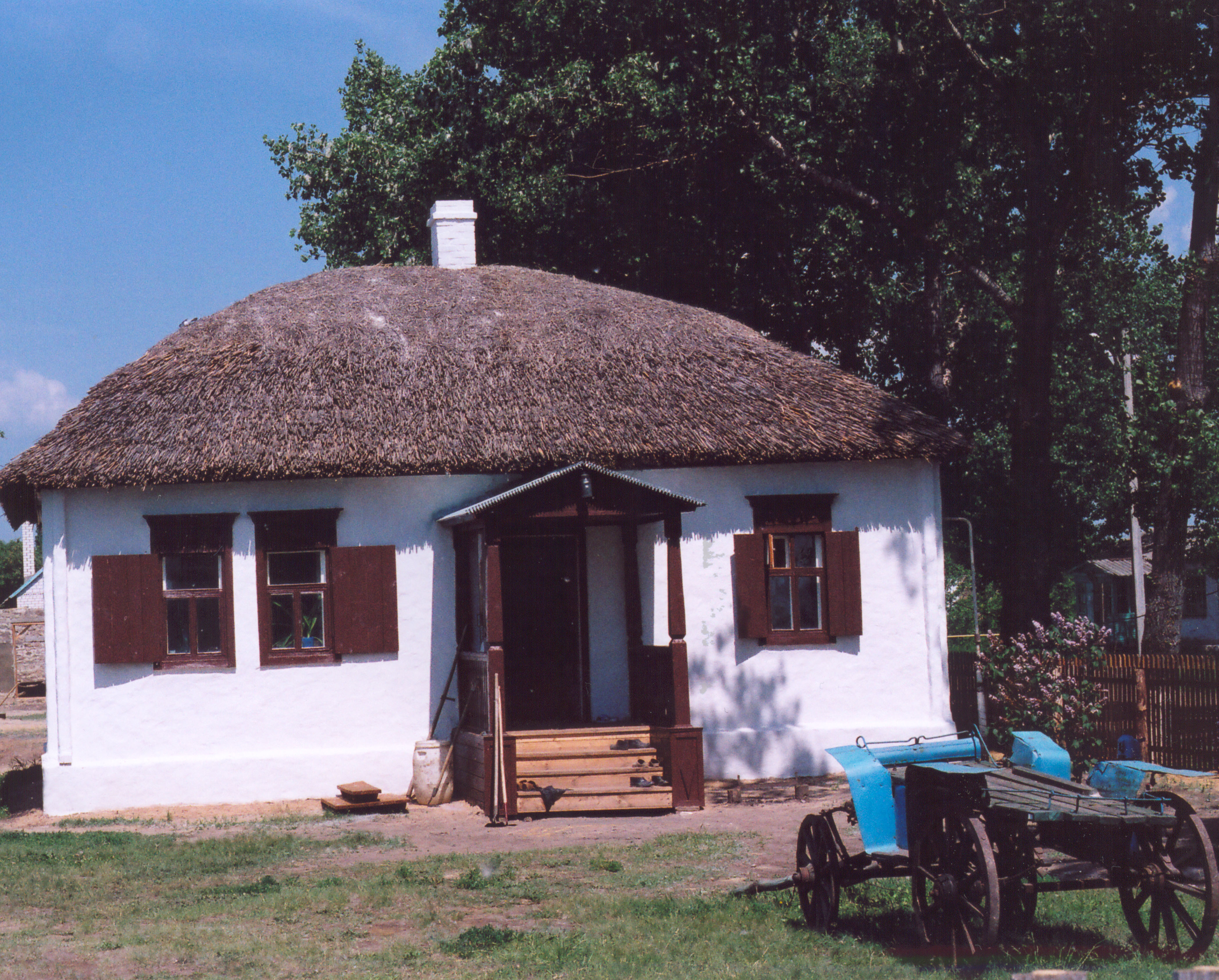 На снимке: домик Шолохова. Русский писатель Михаил Александрович Шолохов родился 11 (24) мая 1905 года на хуторе Кружилин казачьей станицы Вёшенская Войска Донского (ныне Шолоховского района Ростовской области), на юге России. Шолохов – внебрачный сын украинки, вдовы донского казака, А. Д. Кузнецовой (1871-1942) и богатого приказчика, сеющего хлеб на арендованной казачьей земле, управляющего паровой мельницы (сына купца, из Рязанской губернии) А. М. Шолохова (1865-1925).